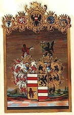 Wappenabbildung aus dem Ritterstandsdiplom des Franz I. (Kaiser von Österreich, 1768-1835) für Christoph von Moro, nachdem die Gebrüder Christoph und Johann Moro vom selben Monarchen bereits ein mit 21. Mai 1816 datiertes Adelstandsdiplom erhalten hatten. Ritterstandsdiplom ausgestellt in Wien, 11. Mai 1820, eigenhändige Unterschrift des Kaisers. Pergamentlibell, 18 Seiten, in Samtmappe gebunden, mit zum Teil goldverzierter Schrift und handgemaltem Ritterstandswappen, kaiserliches Siegel in Messingkapsel. Metallkassette für Diplom mit Ausnehmung für das Siegel.